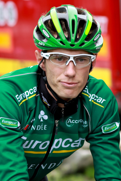 Prologue du Dauphiné Libéré 2011, Saint Jean de Maurienne